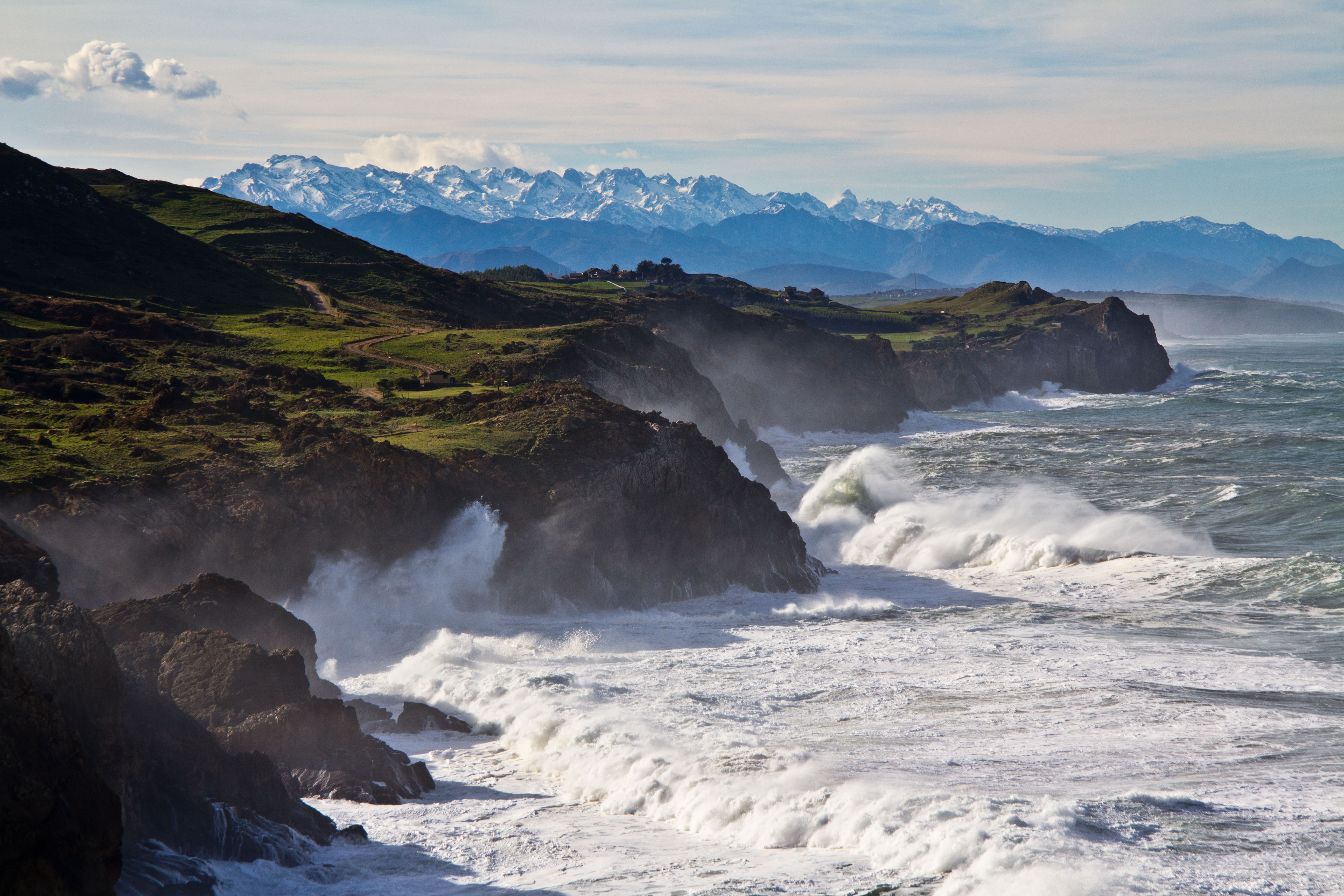 el mejor camino para ir hasta Santiago de Compostela